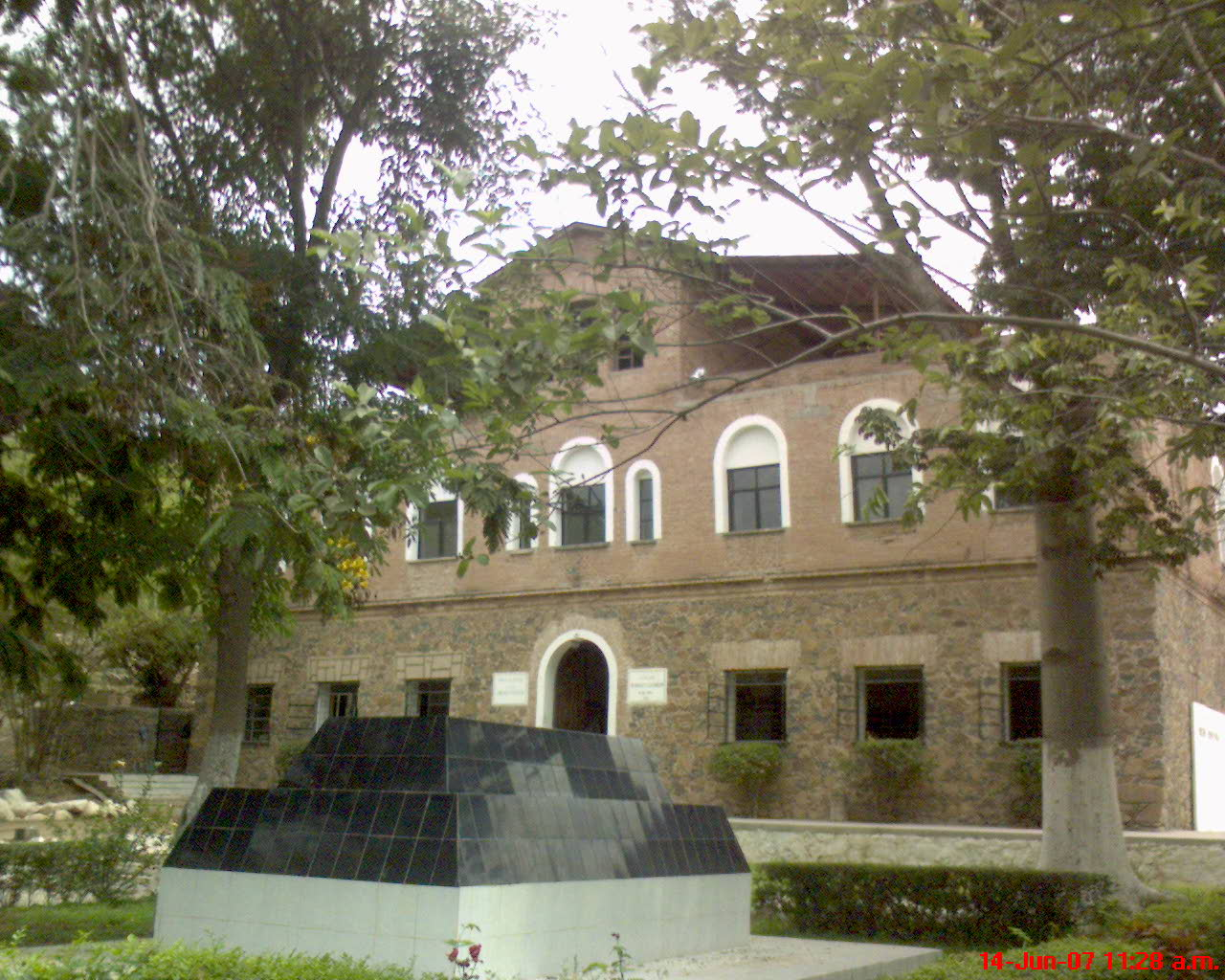 Casa condado espinoza de Los Mochis